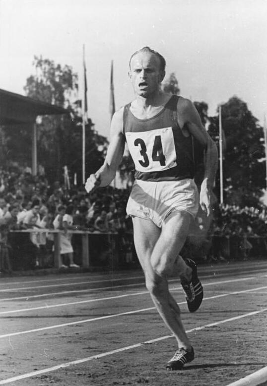 Wöller Zentralbild TBD 3.7.1952 3. Leichtathletik-Meisterschaften der Deutschen Demokratischen Republik vom 2. bis 6.7.1952 im Ernst-Abbe-Sportfeld. Die 3. Leichtathletik-Meisterschaften unserer Republik waren ein Beweis des ständigen Aufstiegs der Leichtathletik in der DDR. UBz: Wöller, Einheit Nordost Berlin, DDR-Meister 1952 im 5000 m Lauf. - Am 2.7.1952 - 15 Uhr wurden die 3. Leichtathletik-Meisterschaften der DDR im Ernst-Abbe-Sportfeld, Jena eröffnet. Die 3.Leichtathletik-Meisterschaften sind eine neue Demonstration des ständigen Aufschwungs der Leichtathletik in der DDR. Sie stehen gleichzeitig im verstärkten Kampf um die die Einheit Deutschlands, gegen Generalkriegsvertrag und für die Erhaltung des Weltfriedens. - Leihweise ZentralBild